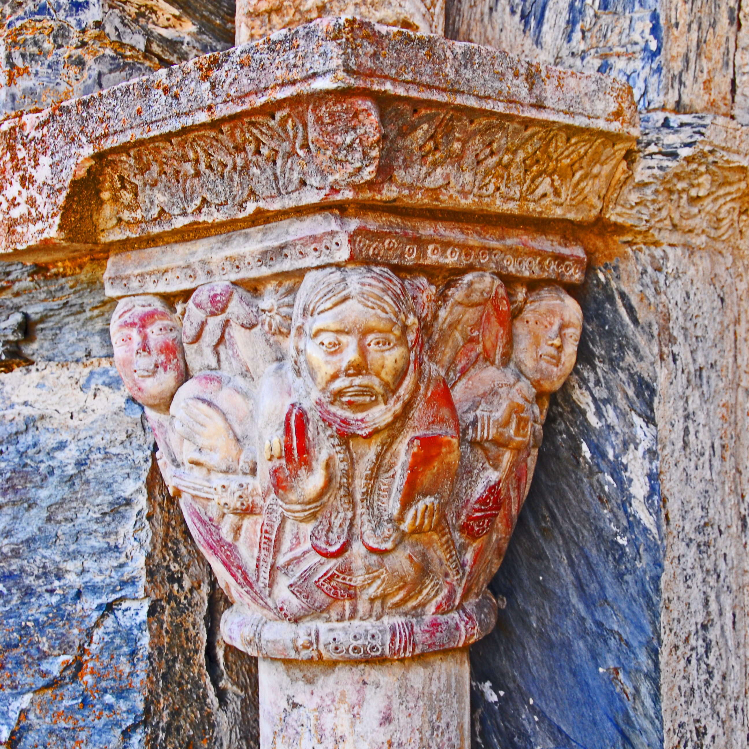 Serrabone, Nordportal, Kapitell Nr. 1